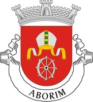 Brasão da Junta de Freguesia de Aborim, no Conselho de Barcelos em Portugal